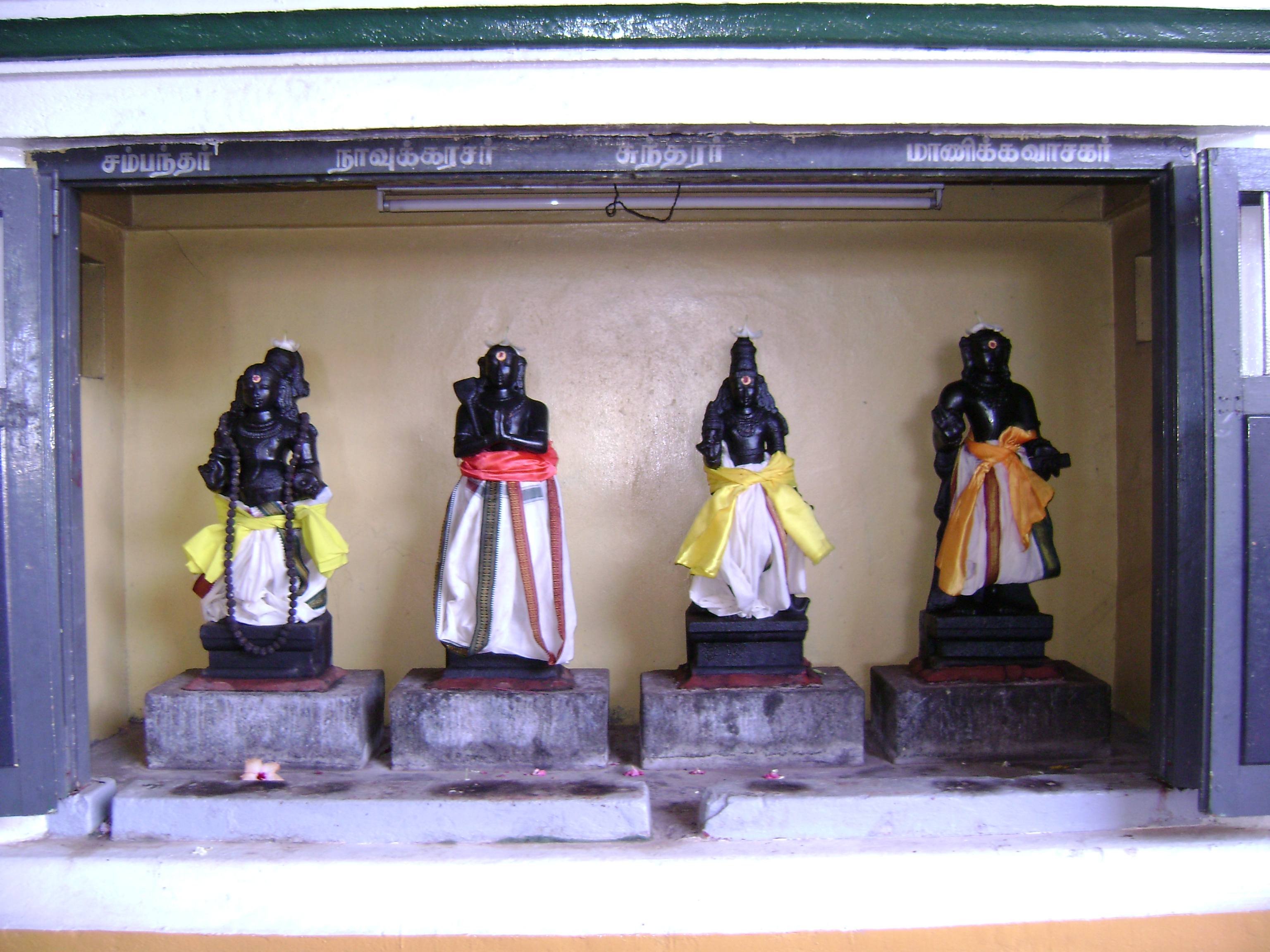 கோணேஸ்வரத்தில் உள்ள 63 நாயன்மார்களின் முதன்மையானவர்களாக சமயகுரவர்களில் விக்கிரகங்கள்.